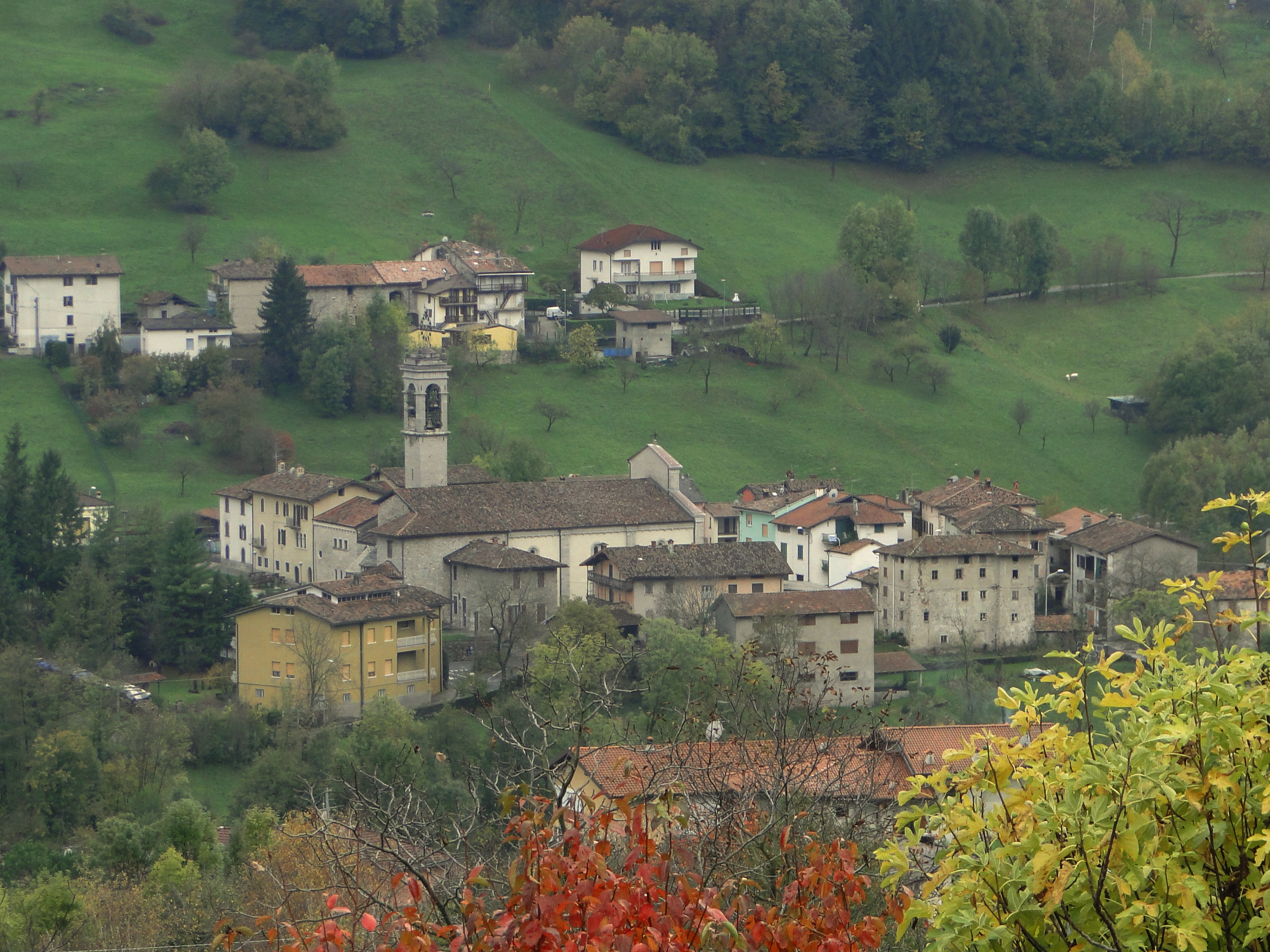 Vista di Abbazia, fraz. di Albino (BG).